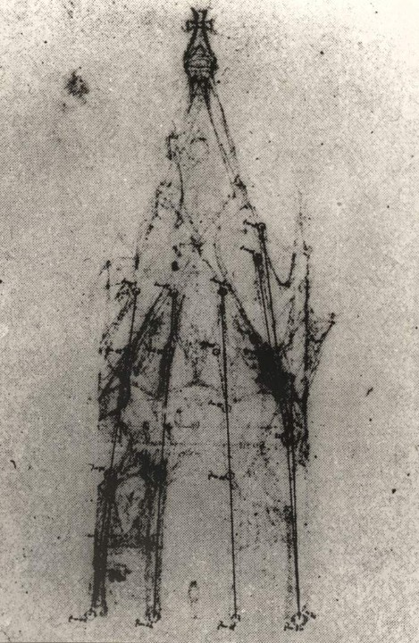 Boceto de capilla de la Asunción para la Sagrada Familia, de Antoni Gaudí.